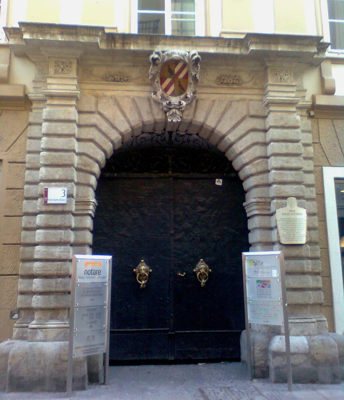 Palais Lengheimb, Graz, Hans-Sachs-Gasse, Portal